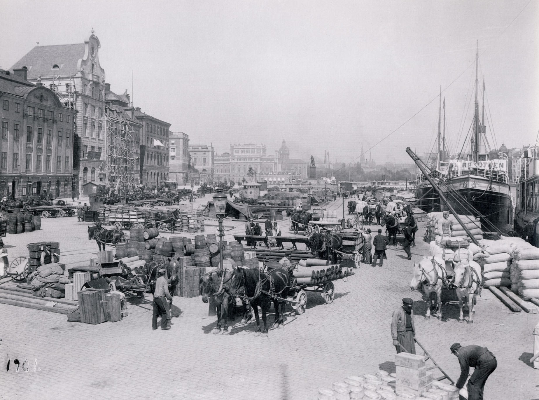 Skeppsbron i Stockholm mot norr